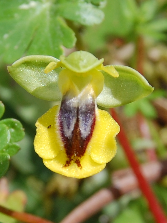 Ophrys phryganae Riserva naturale Monte Pellegrino, Palermo